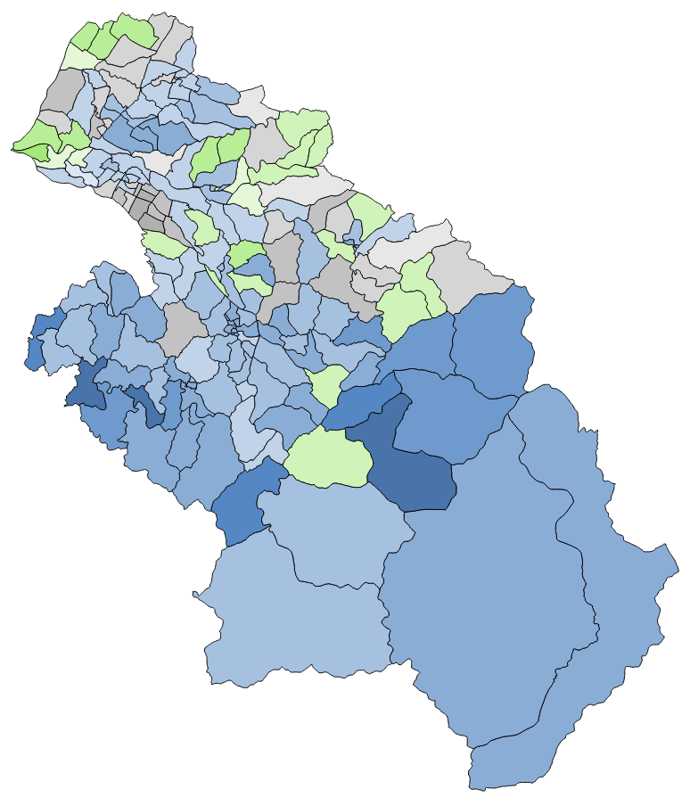 顏色對照表